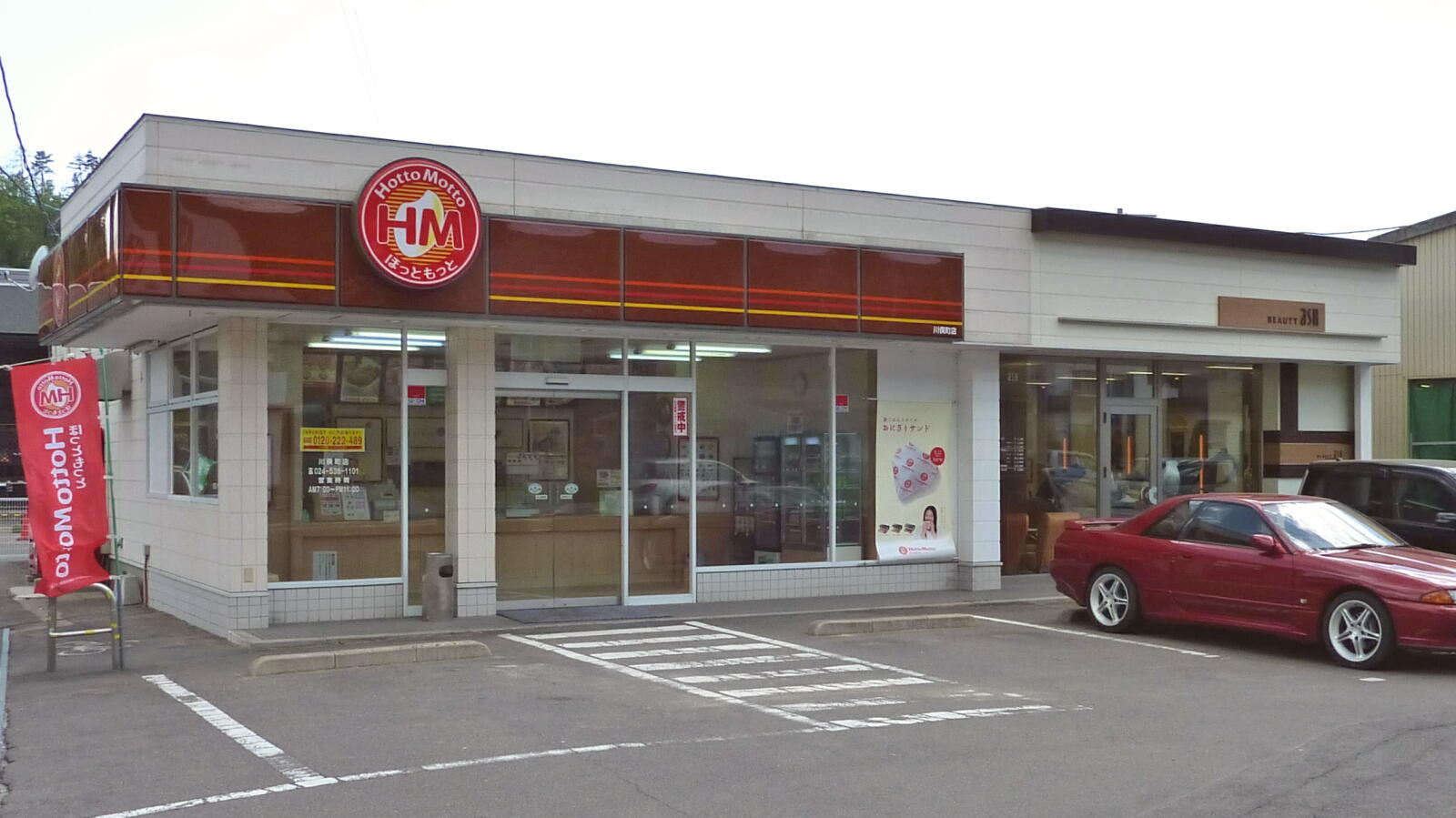 ほっともっと川俣町店